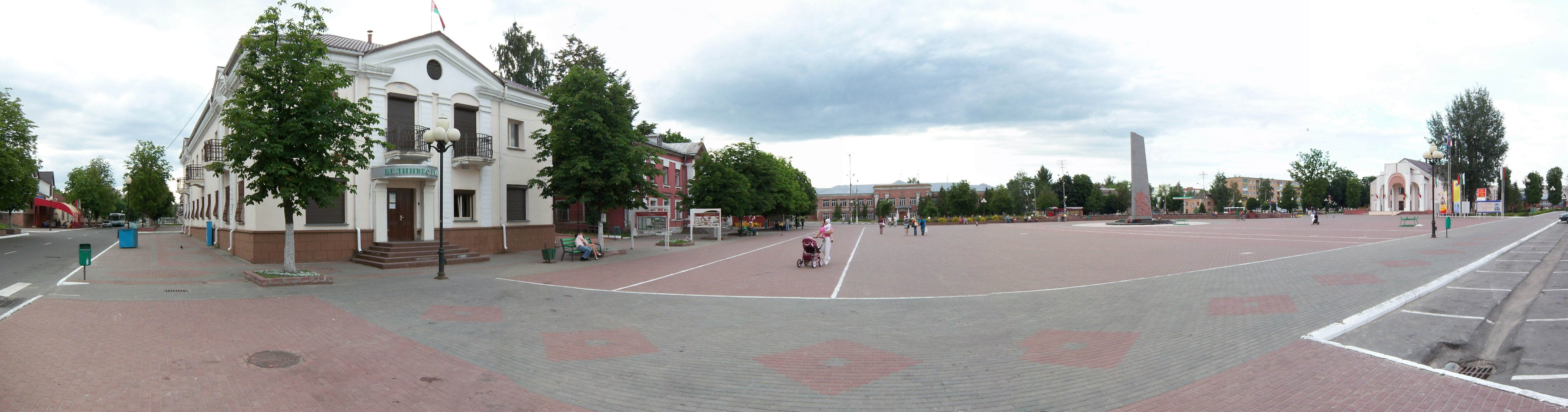 Central Square